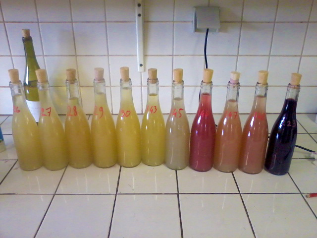 Echantillons de vin brut